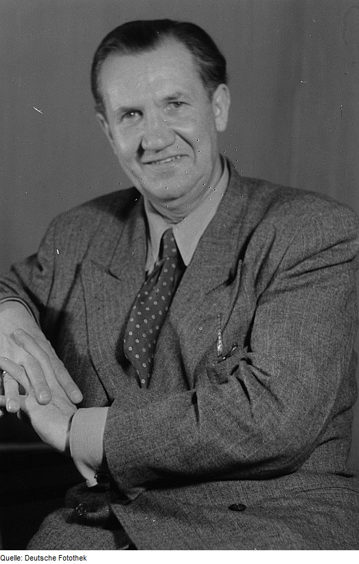 Original image description from the Deutsche Fotothek Portrait Fritz Kampers'